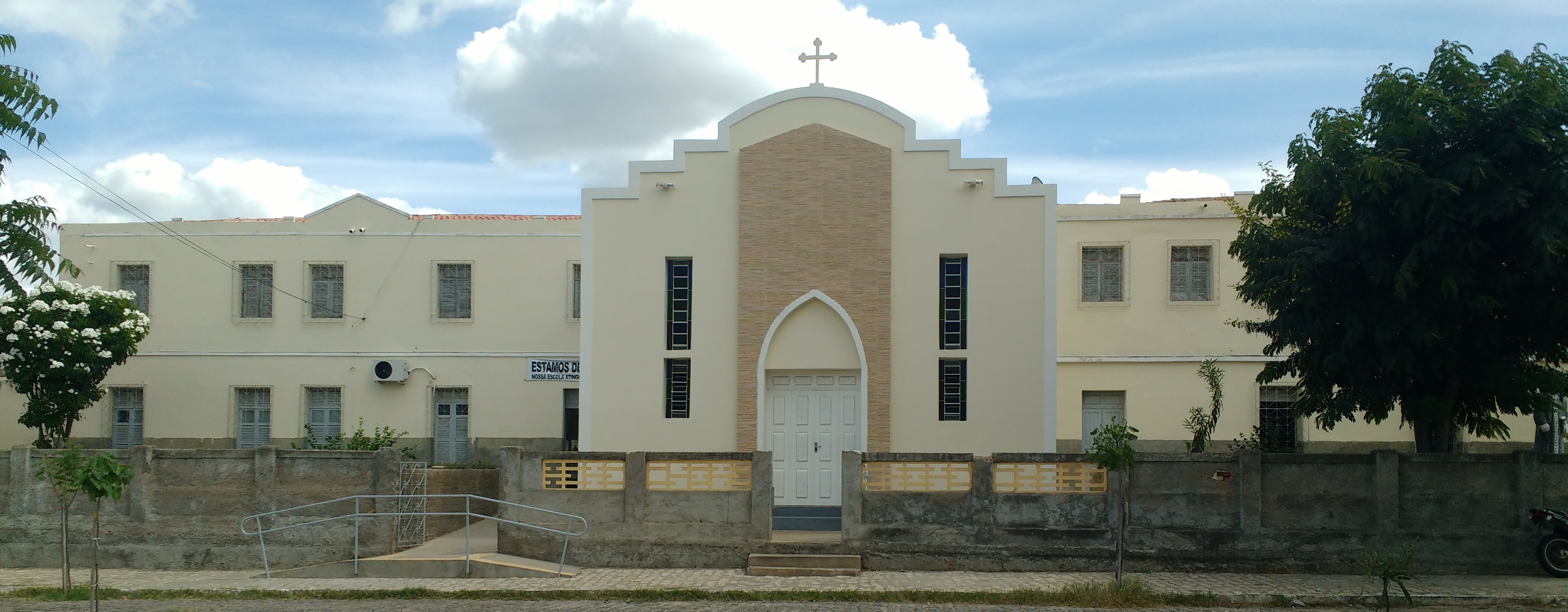 Escola Estadual Patronato Alfredo Fernandes, em Pau dos Ferros, Rio Grande do Norte (Brasil). Ao meio a capela de Nossa Senhora das Graças, da paróquia de Nossa Senhora da Conceição.